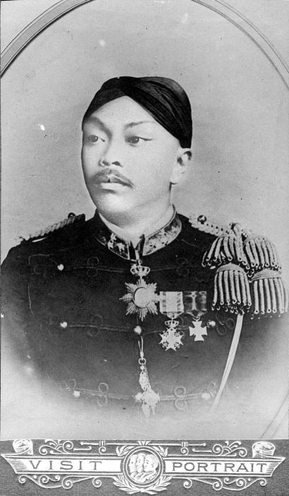 Repronegatif. KGPAA Mangkunegara V, memerintah Mangkunegaran sejak 1881 hingga 1896